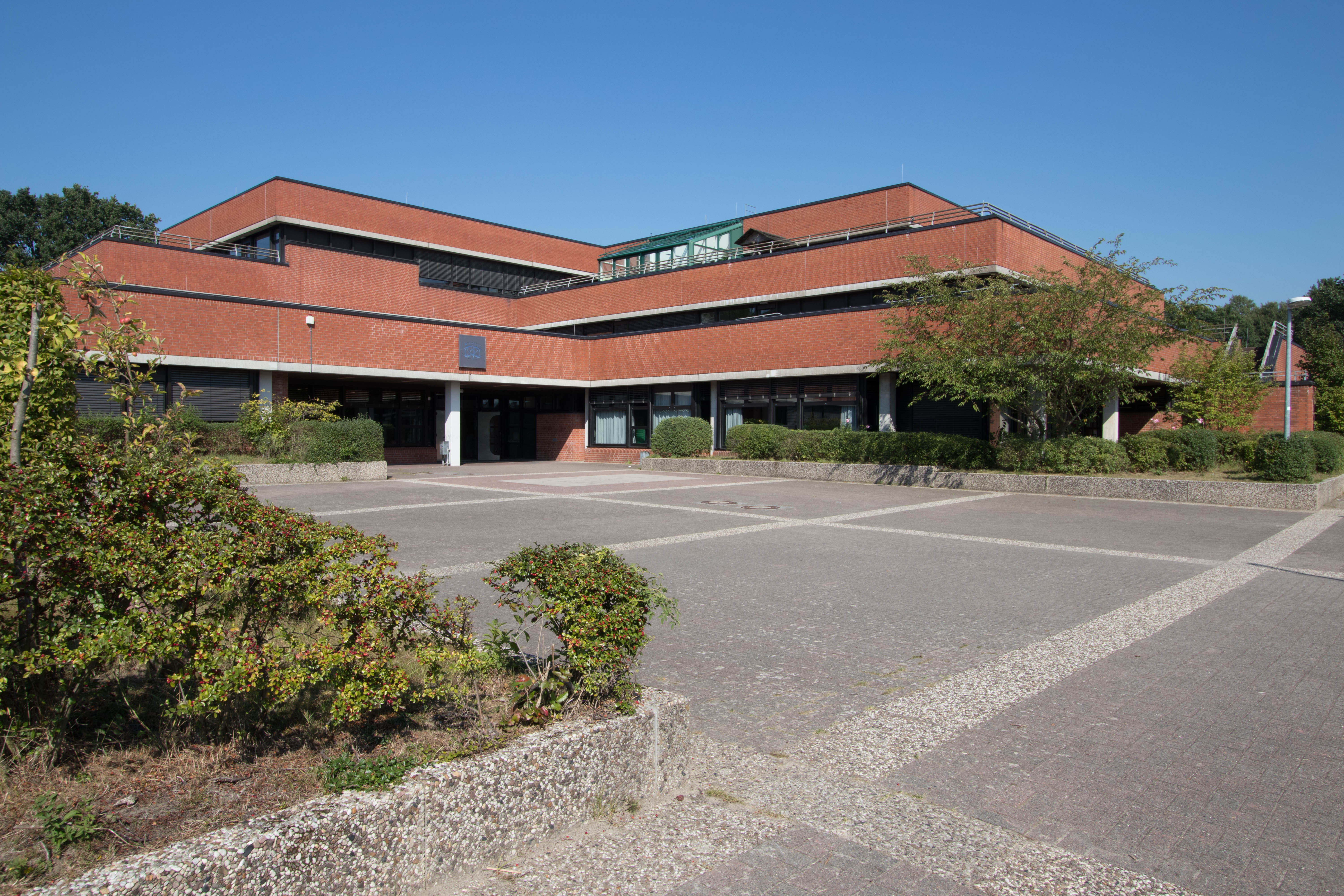 Hauptgebäude des Gymnasiums Johanneum Lüneburg von Südwesten aus gesehen, September 2016